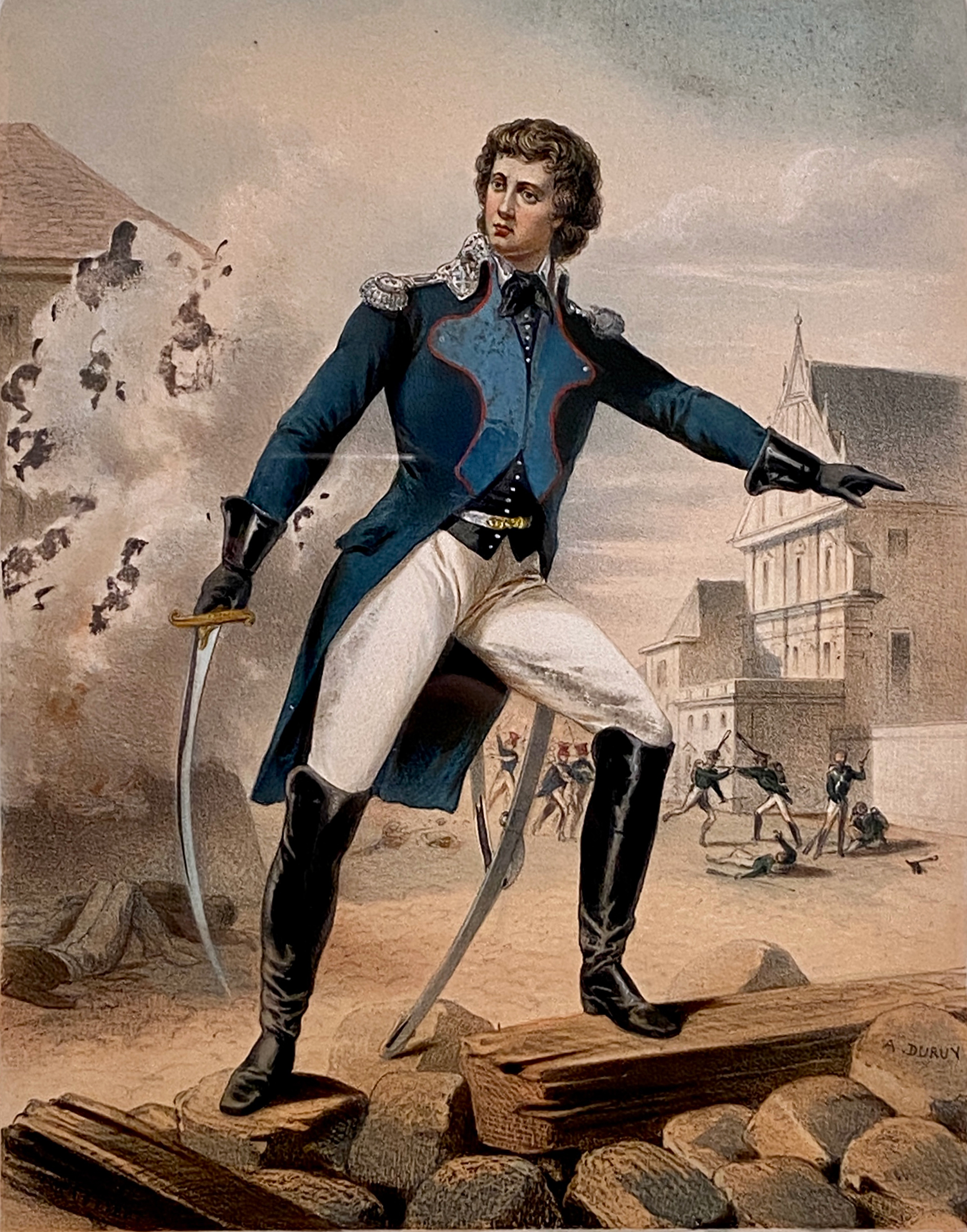 Беларуская (тарашкевіца): Партрэт Якуба Ясінскага (Jakub Jasinski)